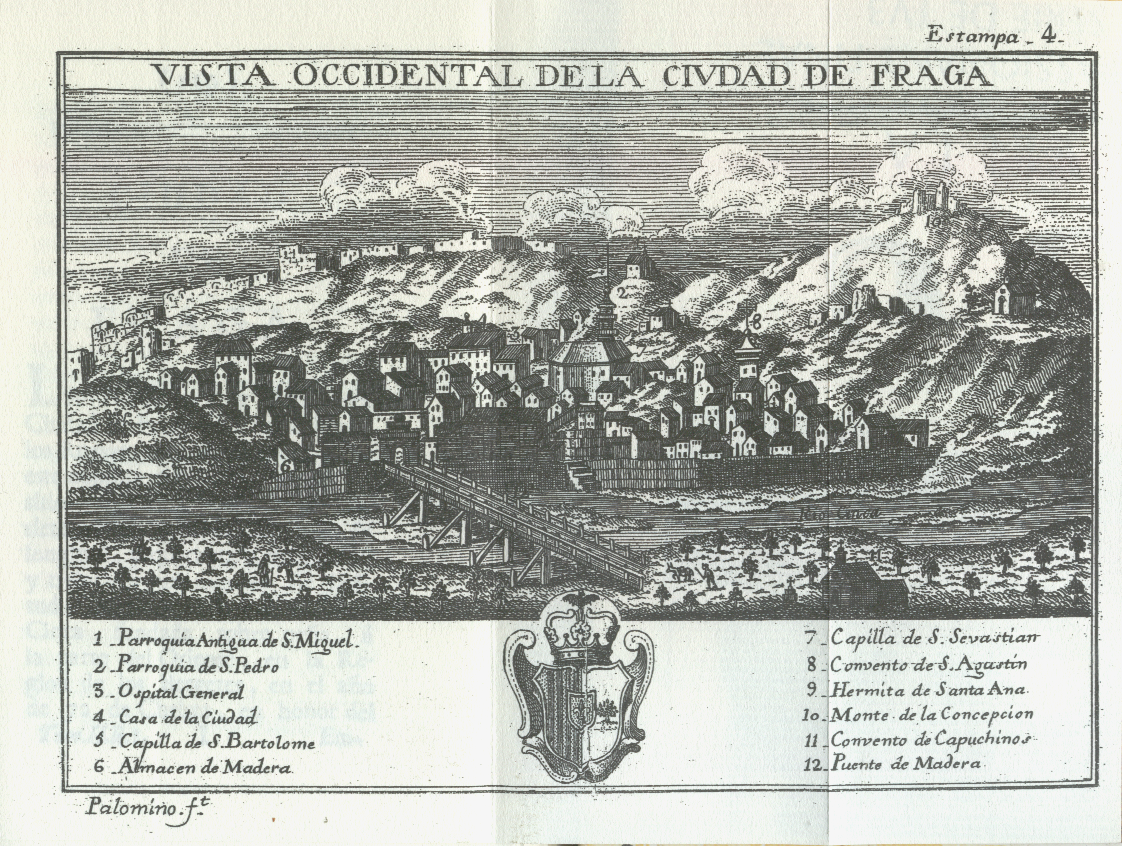 Vista Occidental de la Ciudad de Fraga